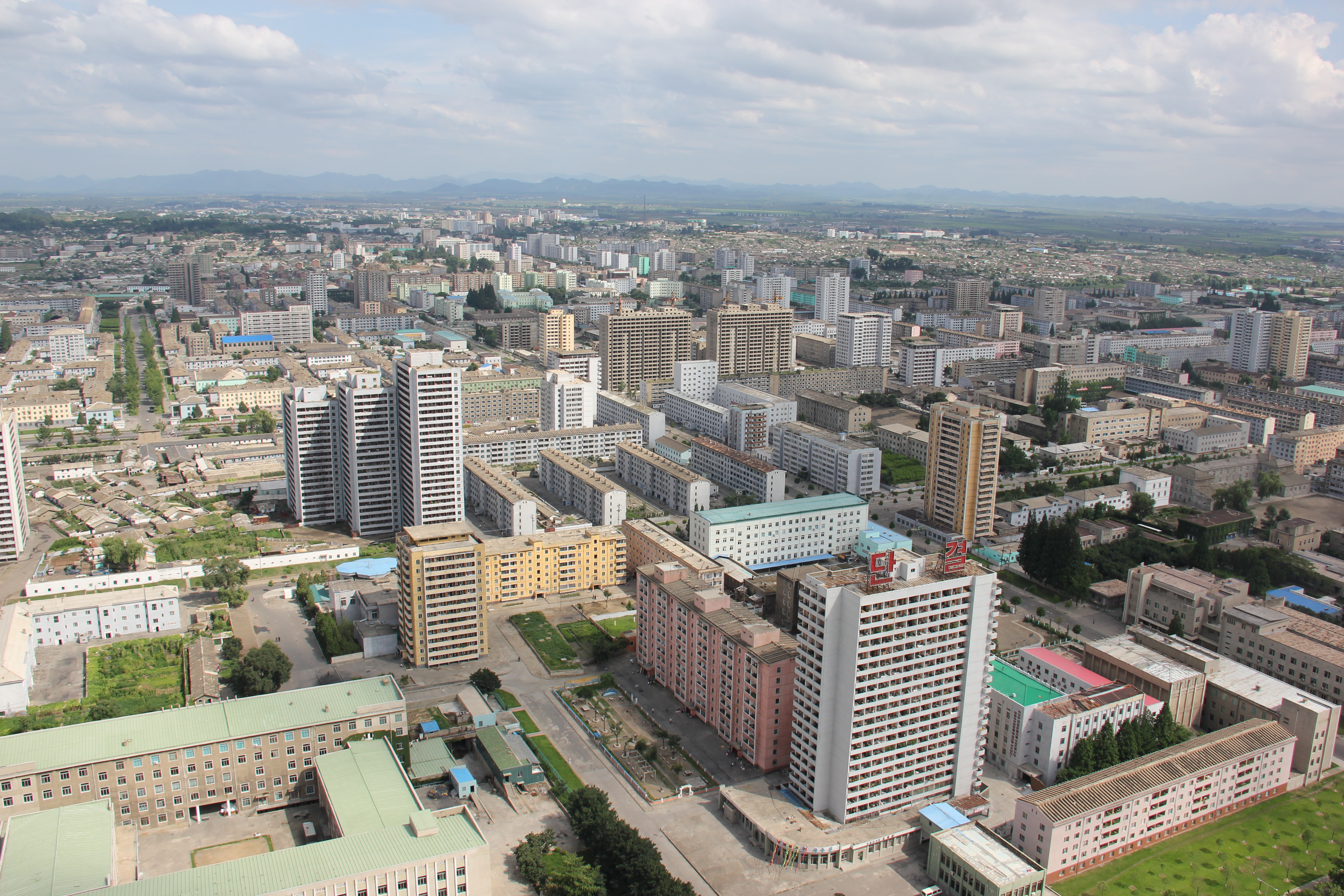 Pyongyang